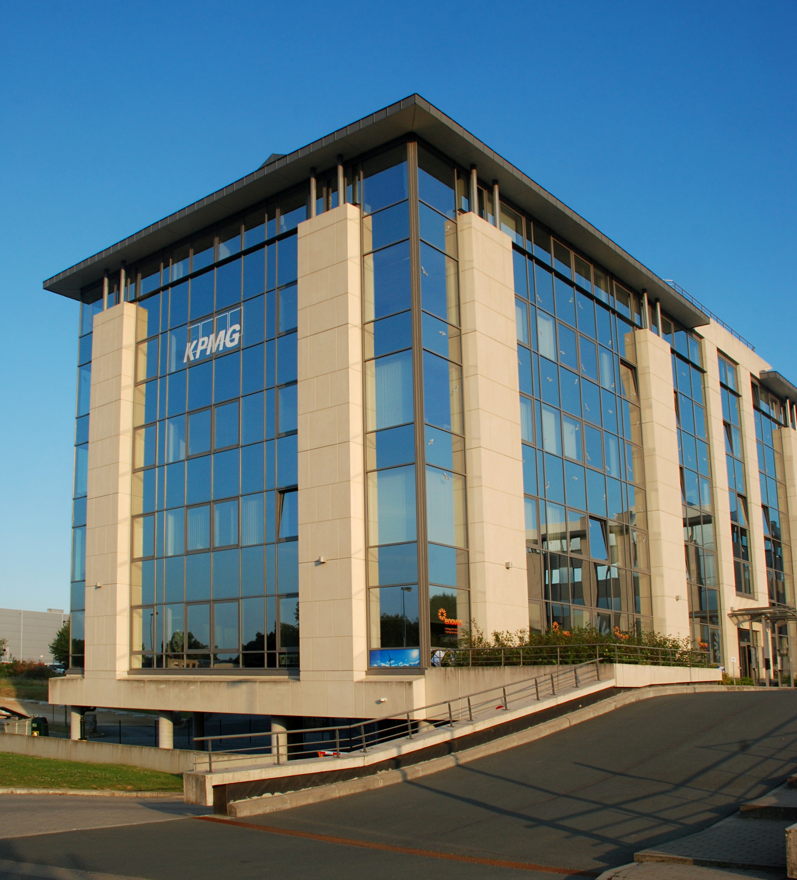 Belgique - Mont-Saint-Guibert - Axis Parc (architecture postmoderne - DSW Architects - 2000)